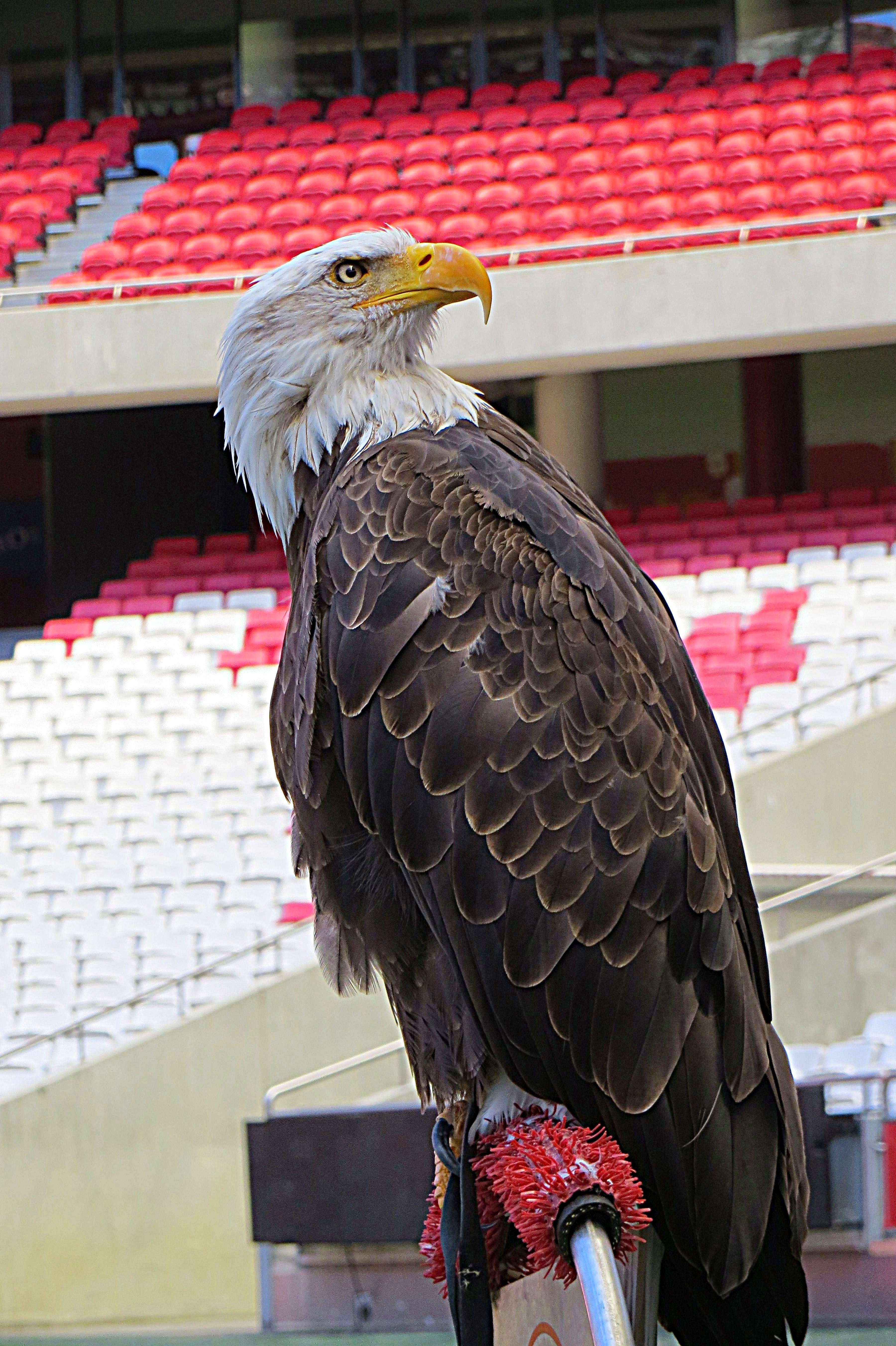 Estadio da Luz